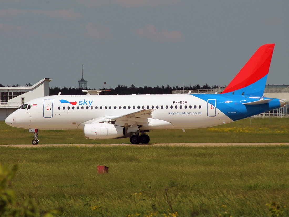 Sukhoi Superjet 100-95 (PK-ECM)